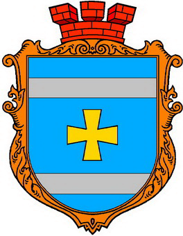 Прапор с. Великі Межирічі